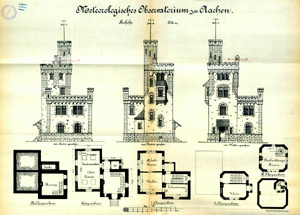 Bauplan der 1. Wetterware Aachen, eingeweiht am 22. September 1900; Archivale des Monats Juli 2016 auf den Seiten des Stadtarchivs der Stadt Aachen